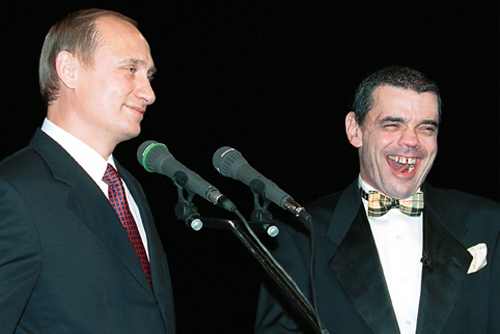 МОСКВА, театр «Сатирикон». Поздравление Константина Райкина с 50-летием.